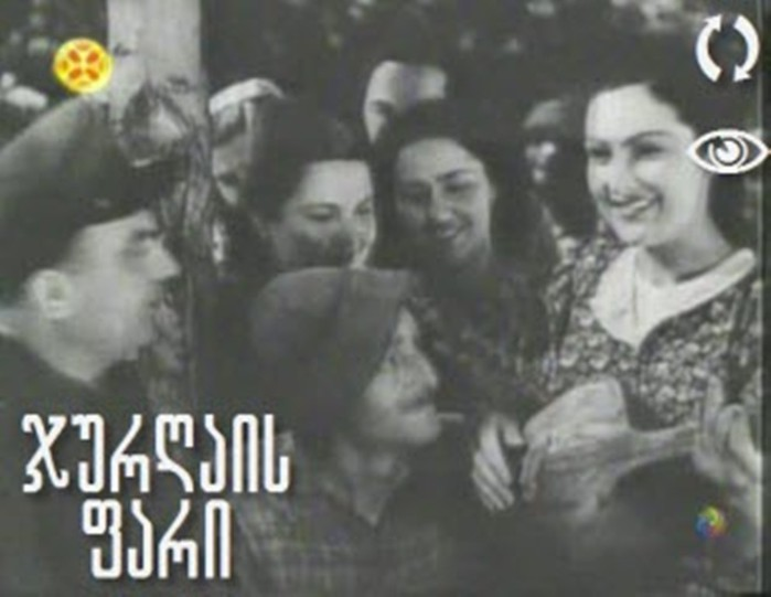 фильм Щит Джургая